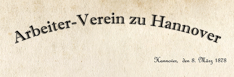 Leicht überarbeitetes Digitalisat der Turnerschaft Hannover von 1852, hier der Briefkopf vom Arbeiter-Verein zu Hannover vom 8. März 1878 ...